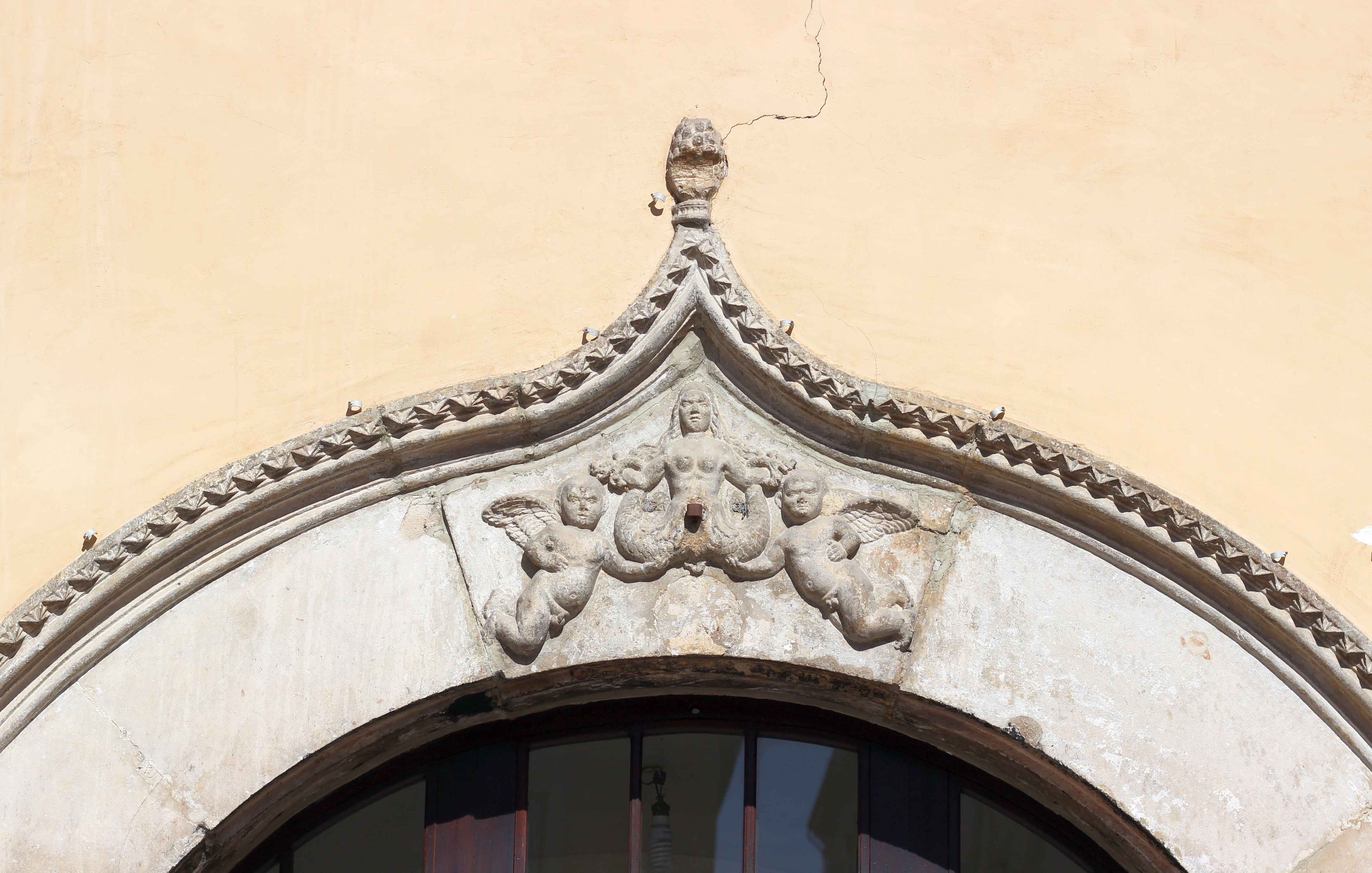 Portal von Palazzo di Giovanni dalle Palle